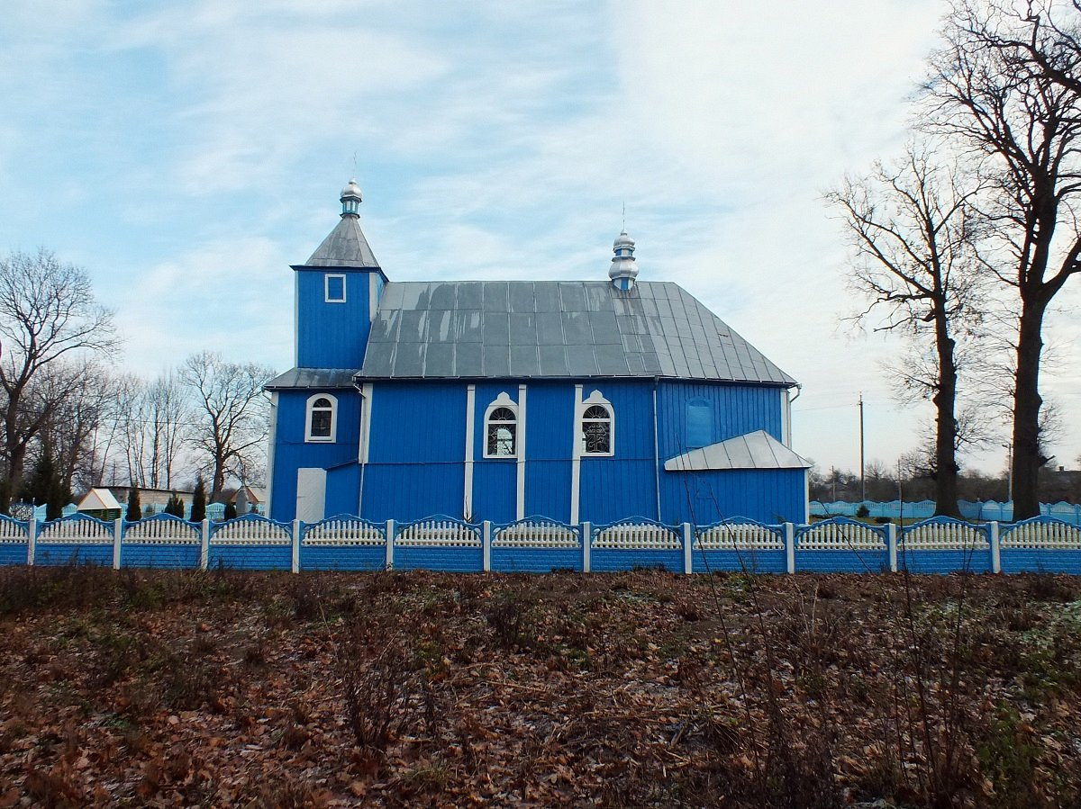 Вялікія Сяхновічы. Свята-Мікалаеўская царква